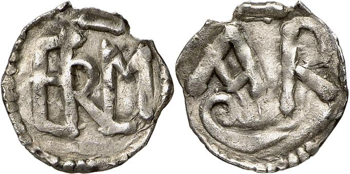 Denier de Carloman Ier (768-771) frappé à Clermont-Ferrand (Puy-de-Dôme). Avers : Monogramme de Carloman, composé des lettres C, A, R, L, M sous un tilde. Revers : Lettres A et R sous un tilde et au-dessus d’un trait courbe. Le seul autre exemplaire connu est conservé à la BnF (1, 27 g.), il est de coins différents. Le trait sous les lettres du revers ressemble à une crosse (?).